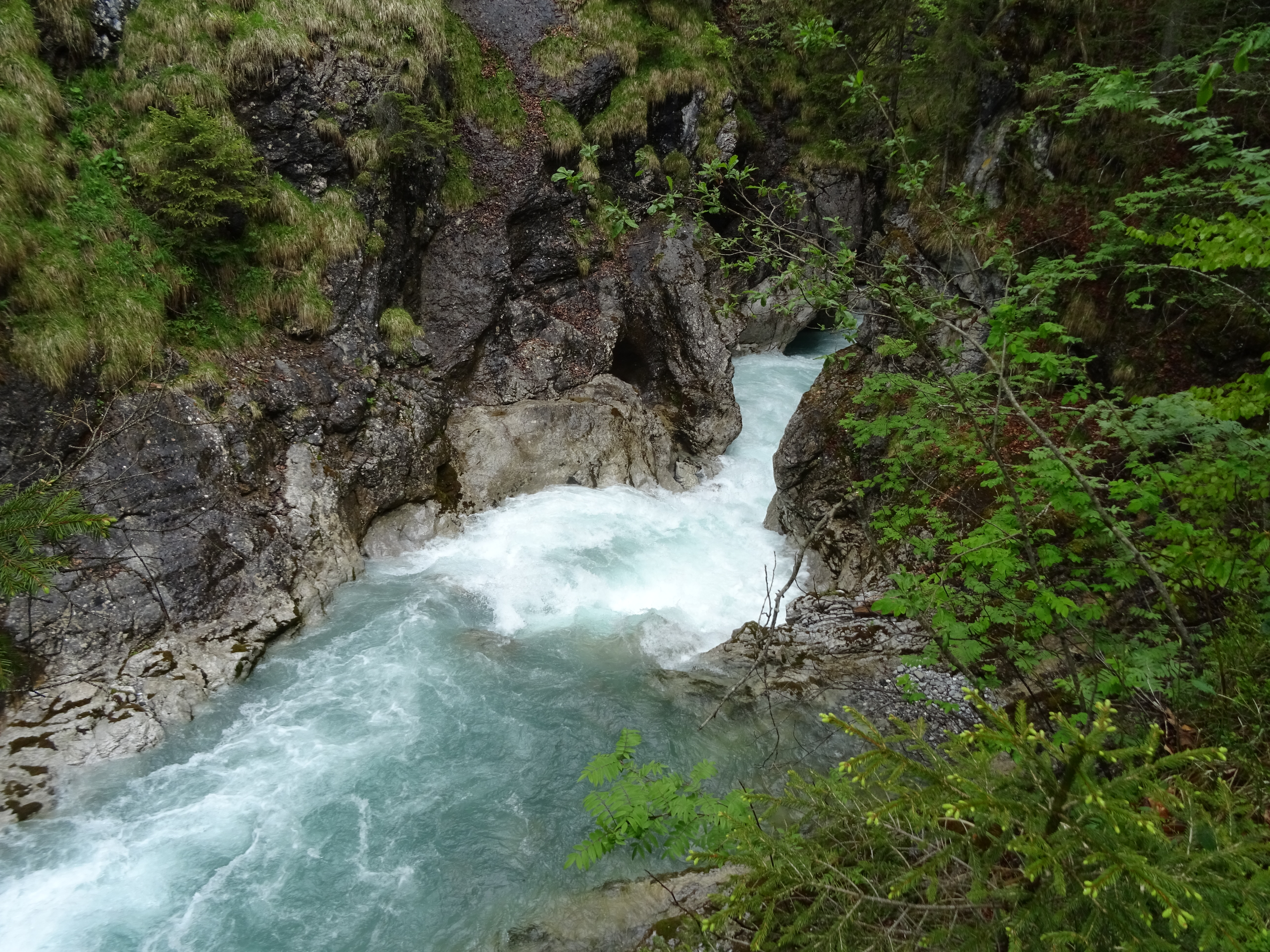 Die Ostrach mit der sogenannten Schlucht „Eisenbreche“ zählt zu den letzten frei fließenden und unverbauten Gewässerabschnitten in Bayern. Die naturbelassene, 85 Meter tiefe Klamm ist als Naturdenkmal bzw. Geotop ausgewiesen und durch ein Naturschutzgebiet, ein Landschaftsschutzgebiet und ein europäisches Natura-2000-Schutzgebiet gleich mehrfach geschützt. Trotzdem soll dort eine gewaltige Staumauer gebaut, der Fluss aufgestaut und sein Wasser durch eine Rohrleitung ausgeleitet werden. Neben der außerordentlichen Verschandelung der Landschaft würden viele an den Wildfluss angepasste Tierarten ihren Lebensraum verlieren.